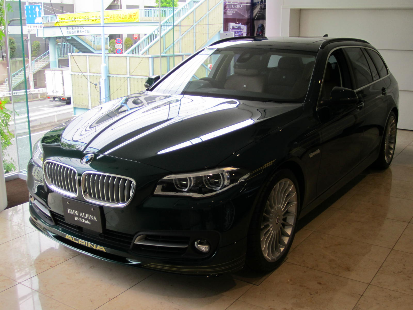 2013B5ツーリングLCI後